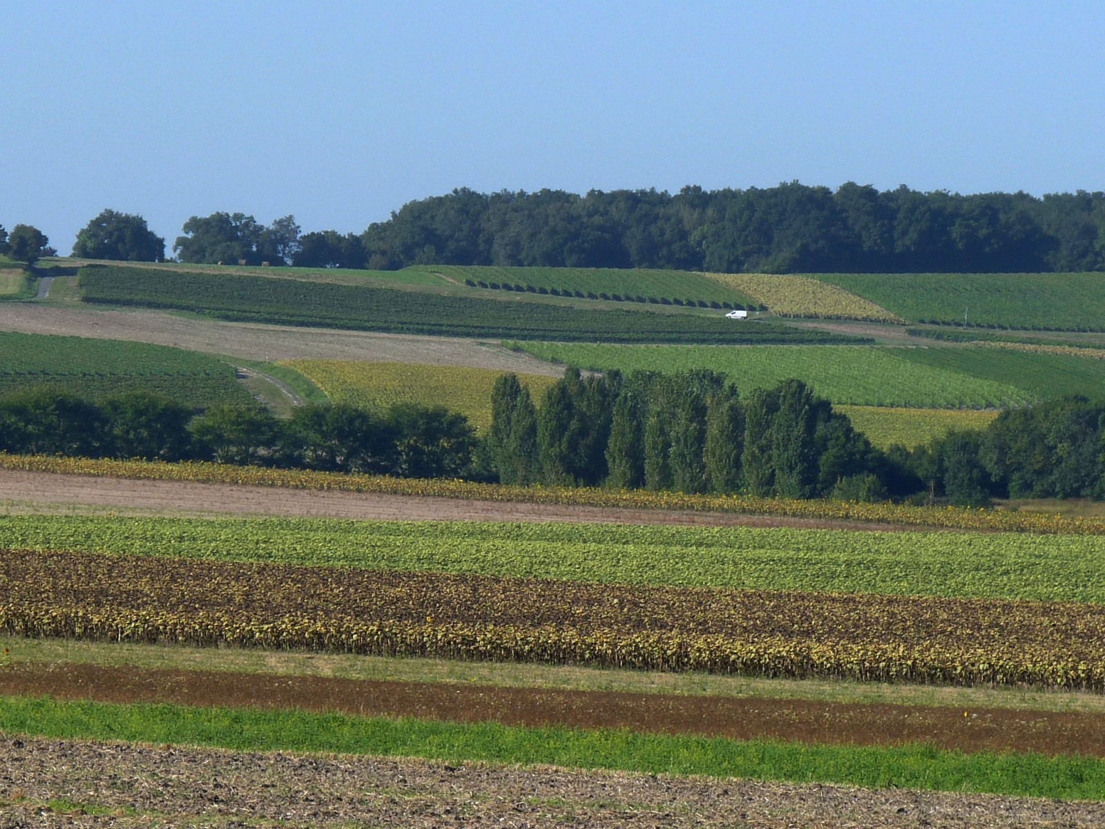 Vue vers le sud, Coulonges (D.128 près limite Pérignac), Charente-Maritime, France